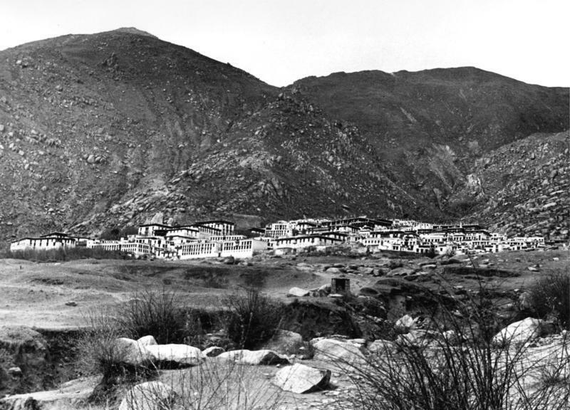 Lhasa, Kloster Drepung